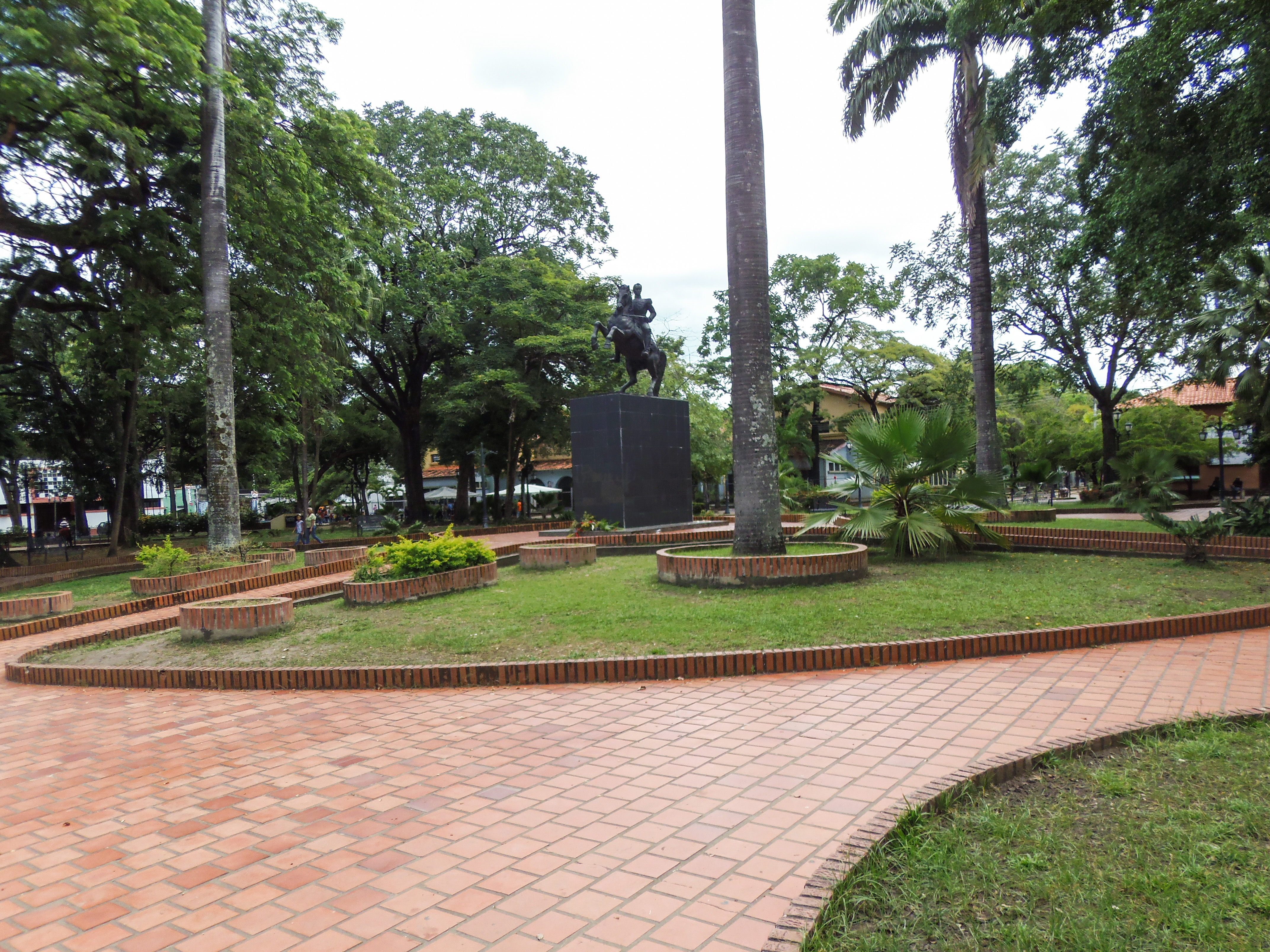 Plaza Bolívar de Barinas